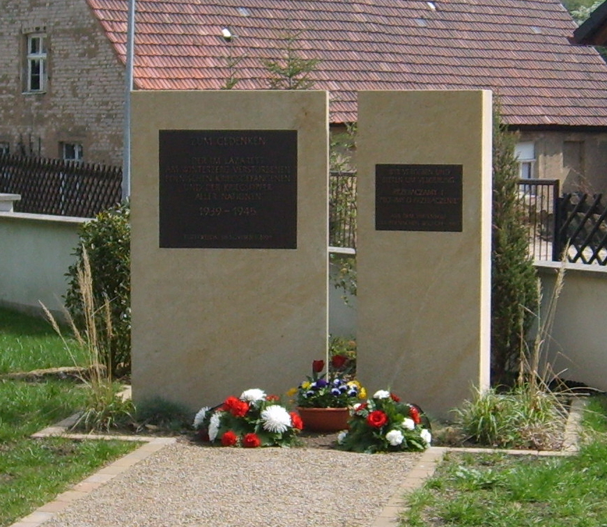 Mahnmal zu Ehren von im Lazarett auf dem Biehlaer Winterberg während des Zweiten Weltkrieges verstorbenen Kriegsgefangenen.